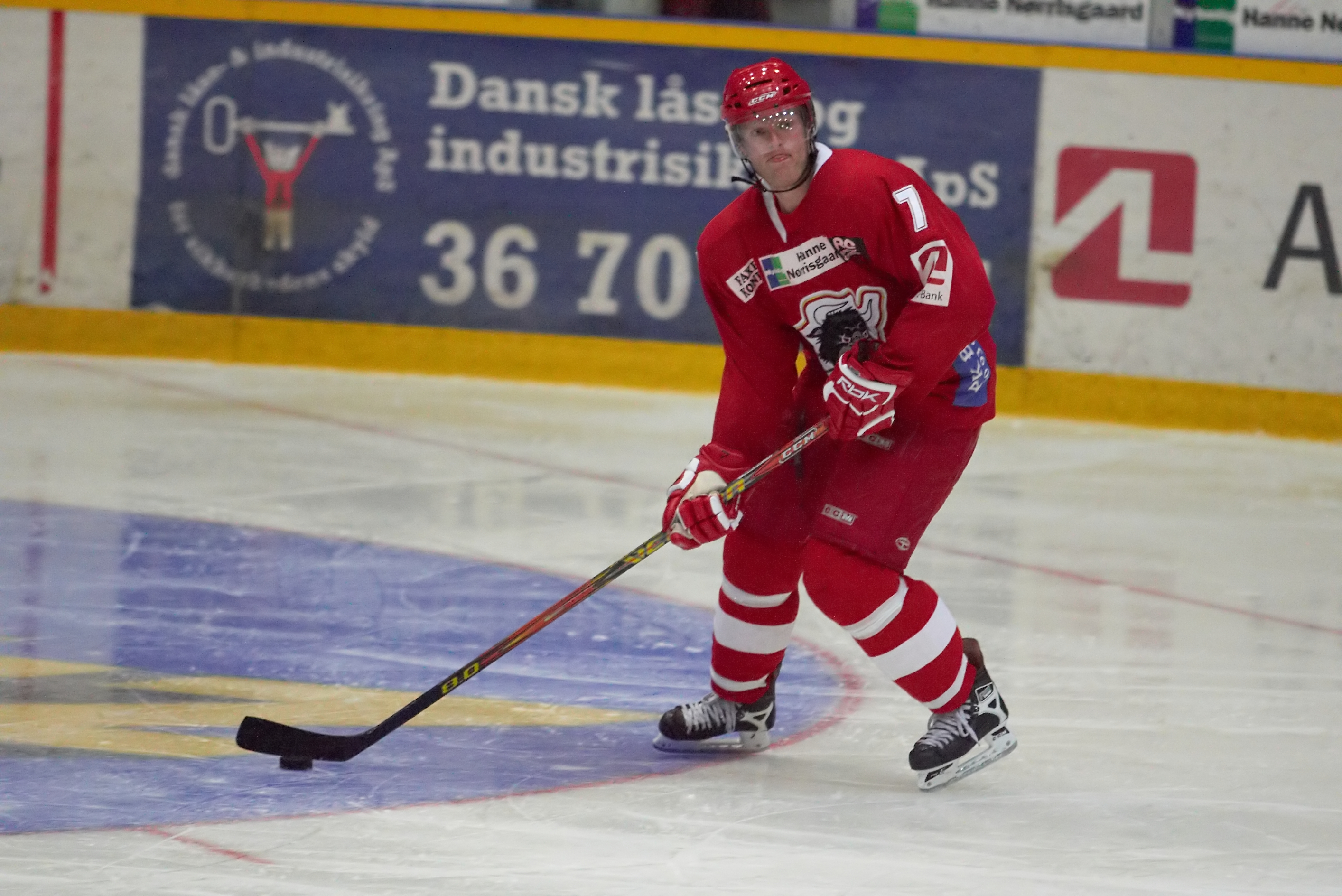 Mr. Jesper Damgaard in action